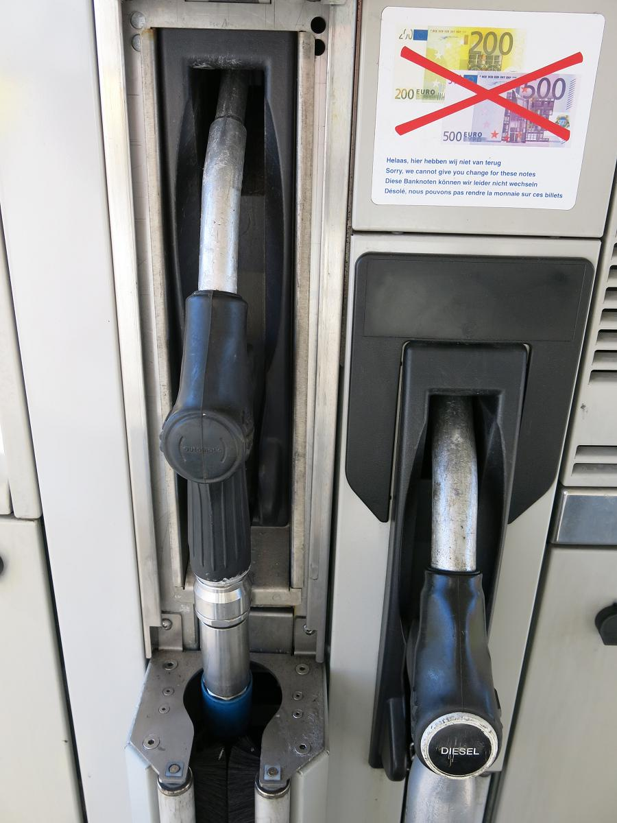 AdBlue Tankstelle (links AdBlue, rechts Diesel)